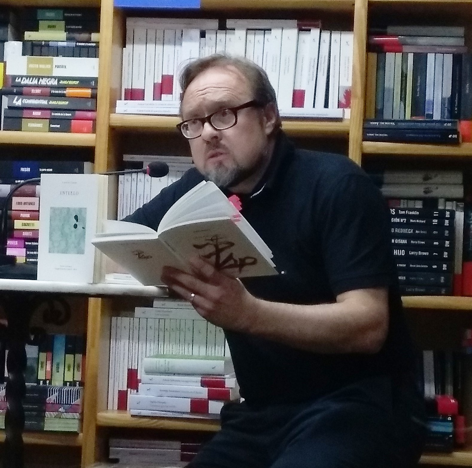 O poeta Baldo Ramos recitando na Libraría Paz de Pontevedra